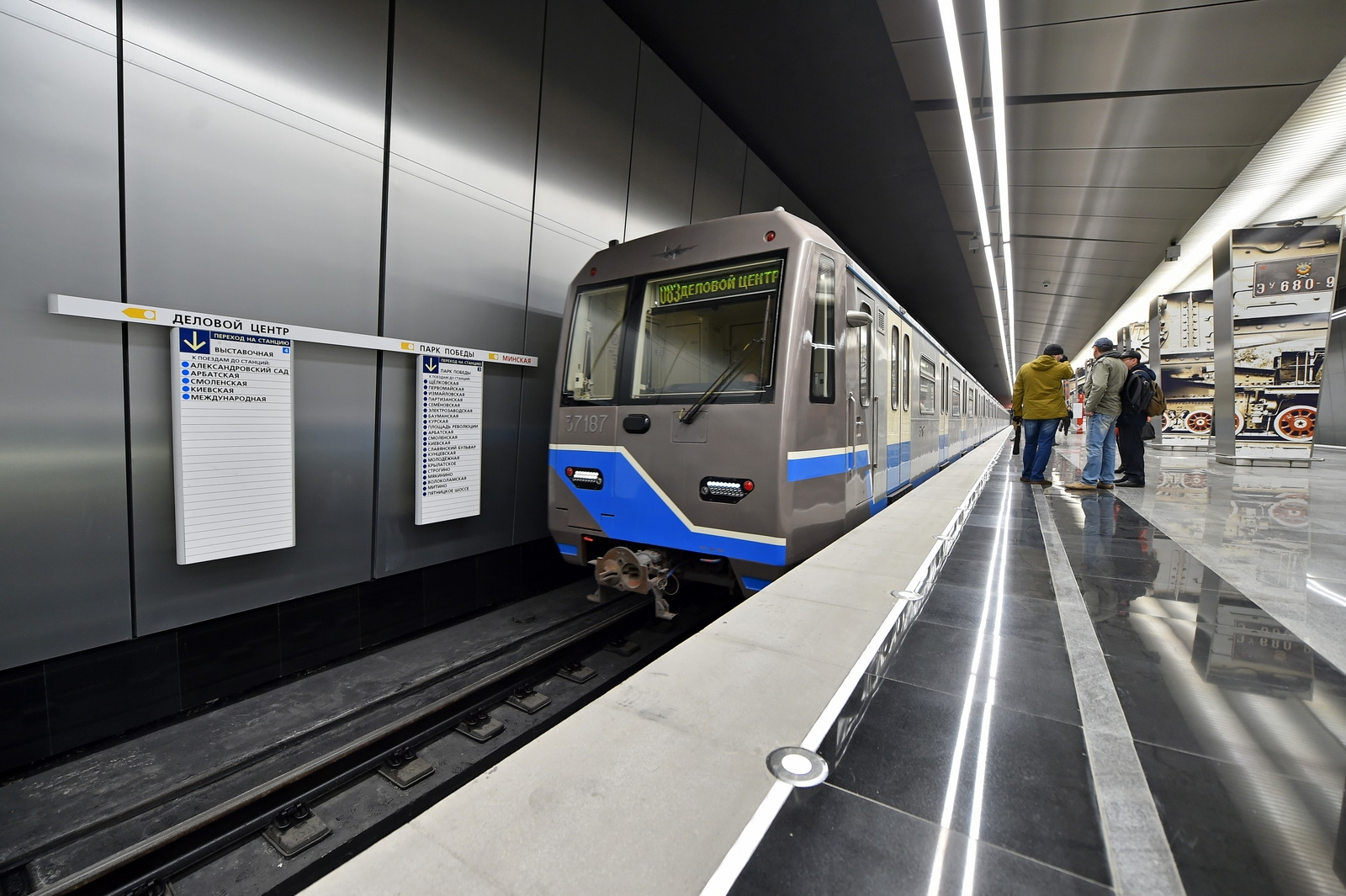 Электропоезд метро 81-760/761 № 37187 на станции Минская Московского метрополитена